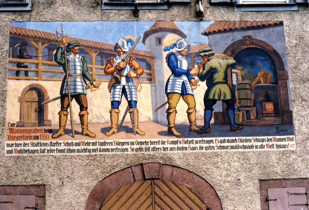 Fassadengemälde von Eduard Trautwein in Wolfach